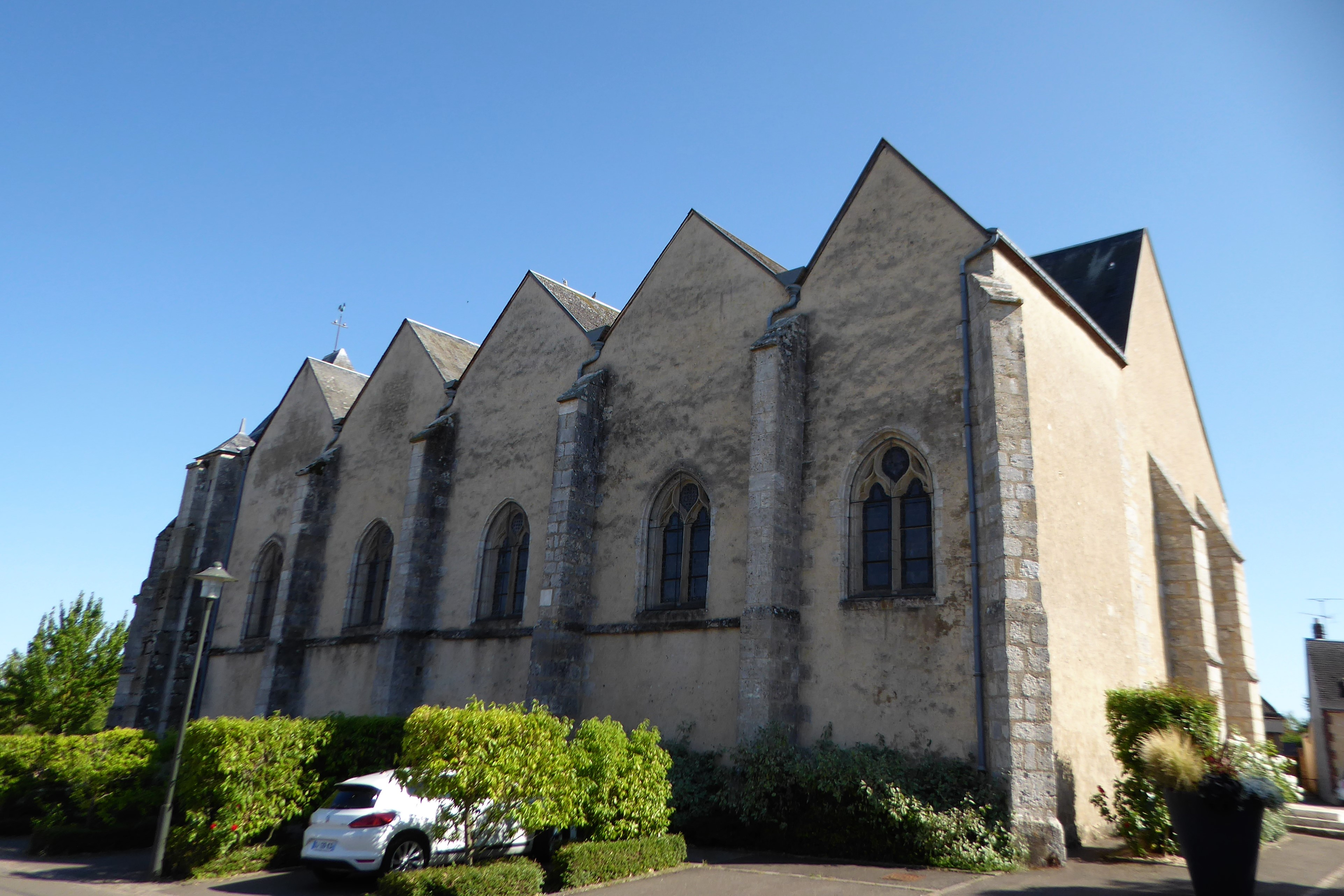 Église Notre-Dame de Dammarie, Eure-et-Loir, France.